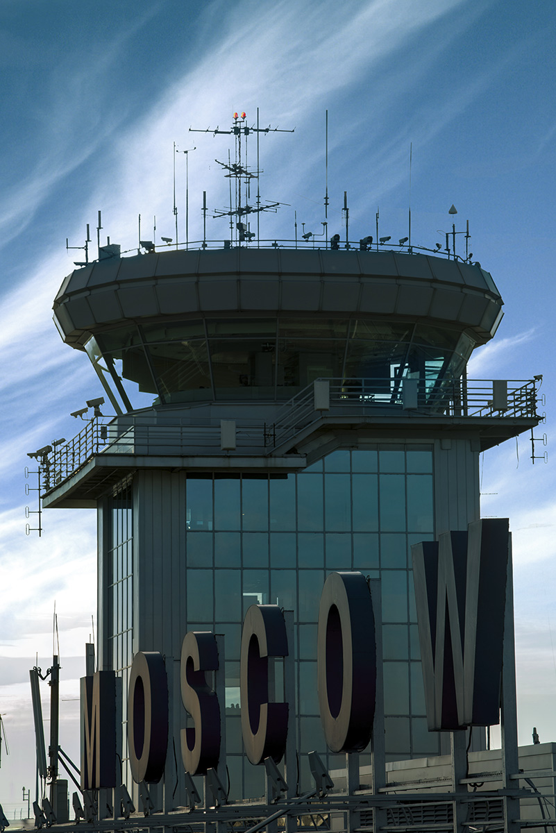 Moscow Domodedovo Airport, Tower